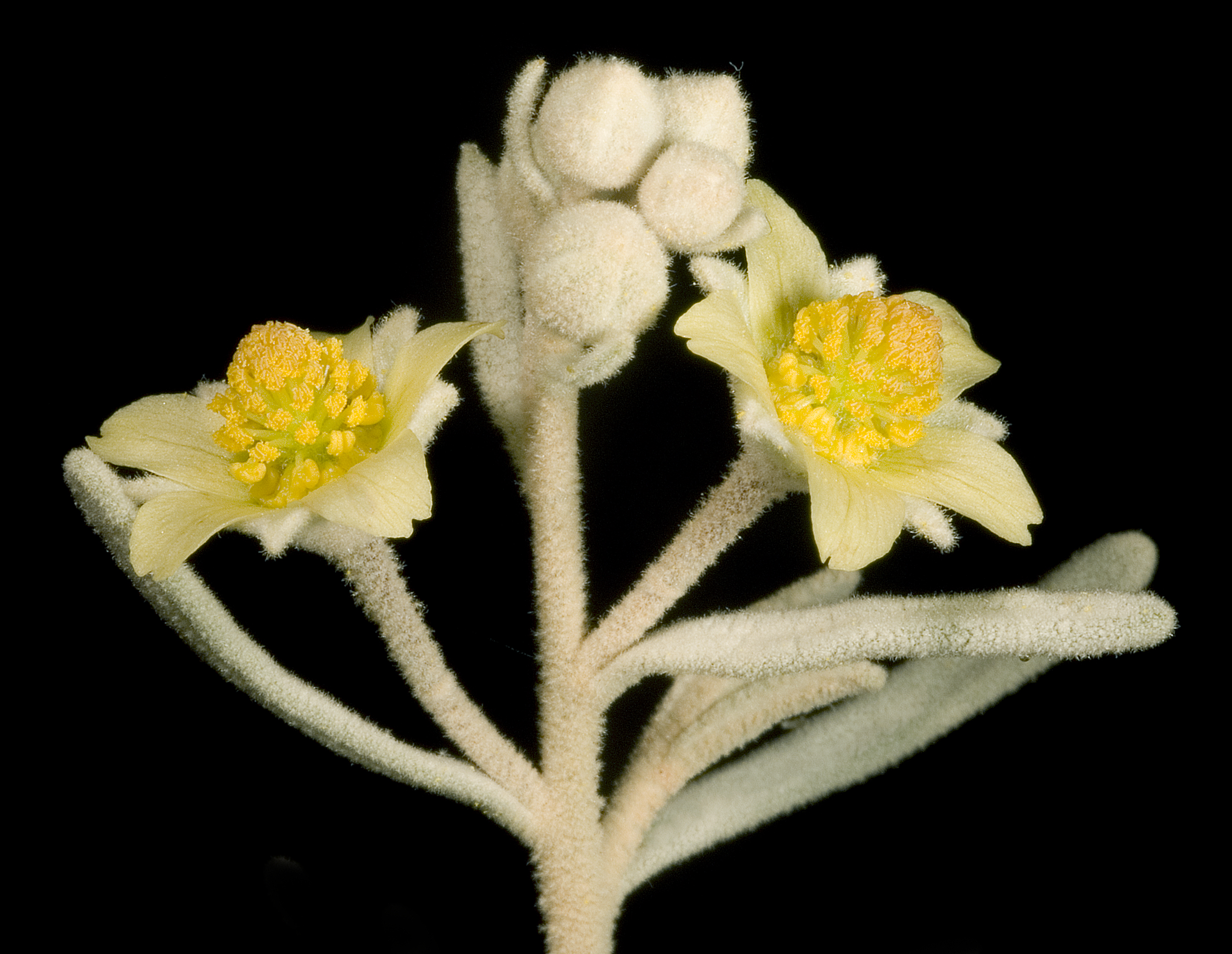 KRT3731